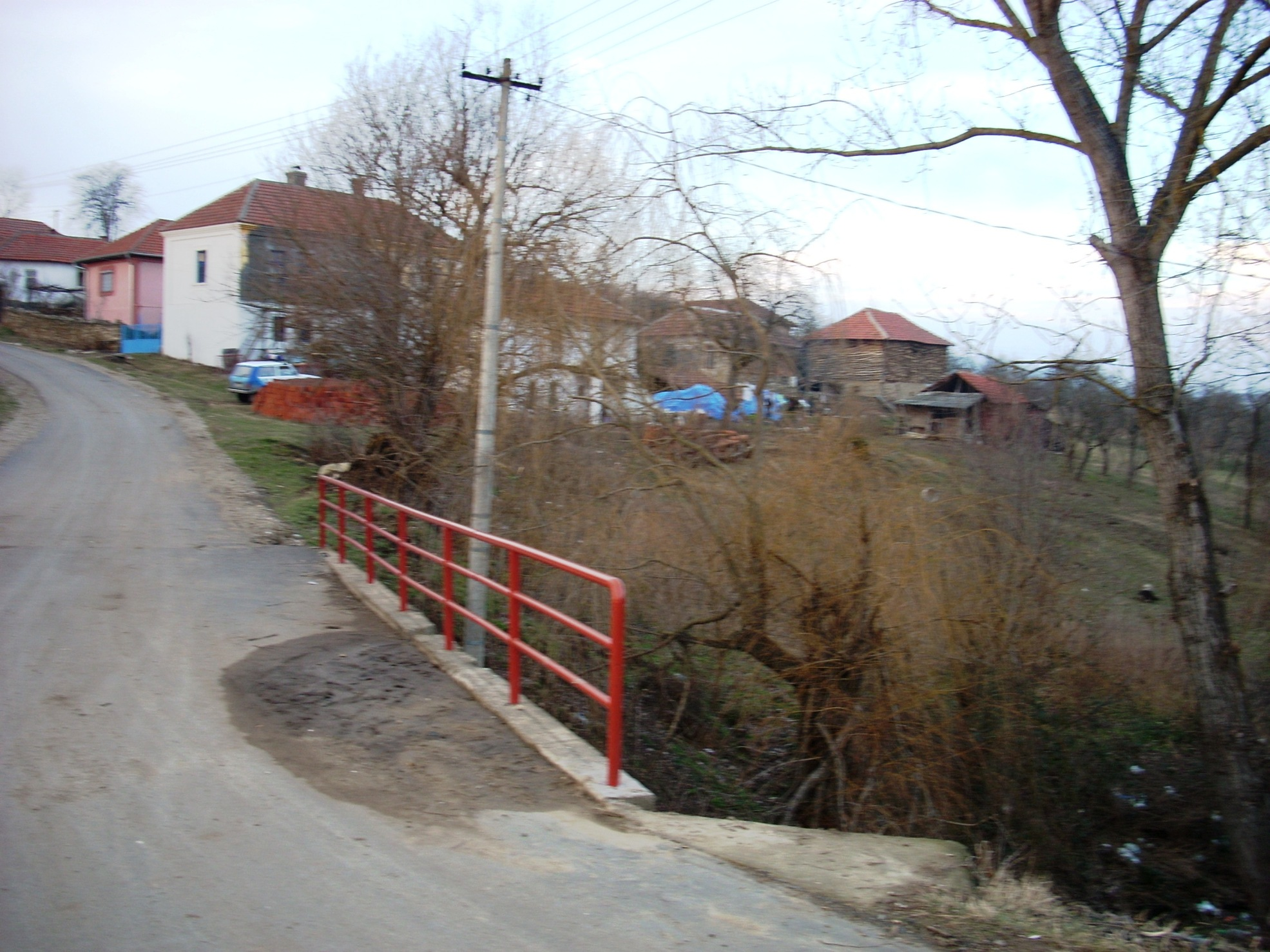 Rečica, Bojnik